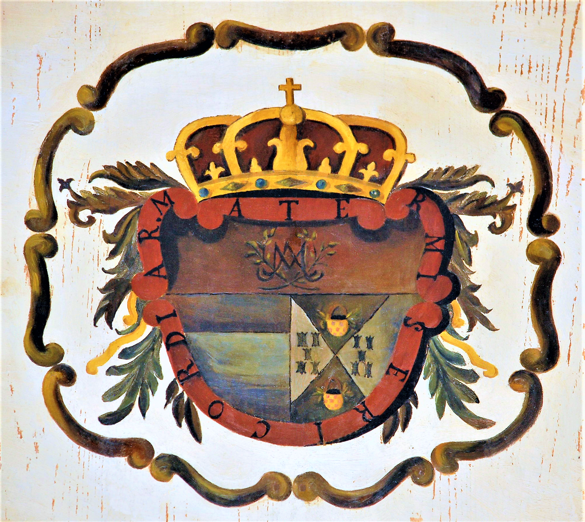 Escudo de armas de Don Luis de Antezana y su esposa Doña Isabel de Guzmán, fundadores del Hospital de Antezana en Alcalá de Henares (Comunidad de Madrid - España). Oleo sobre tablas de madera de 1483.